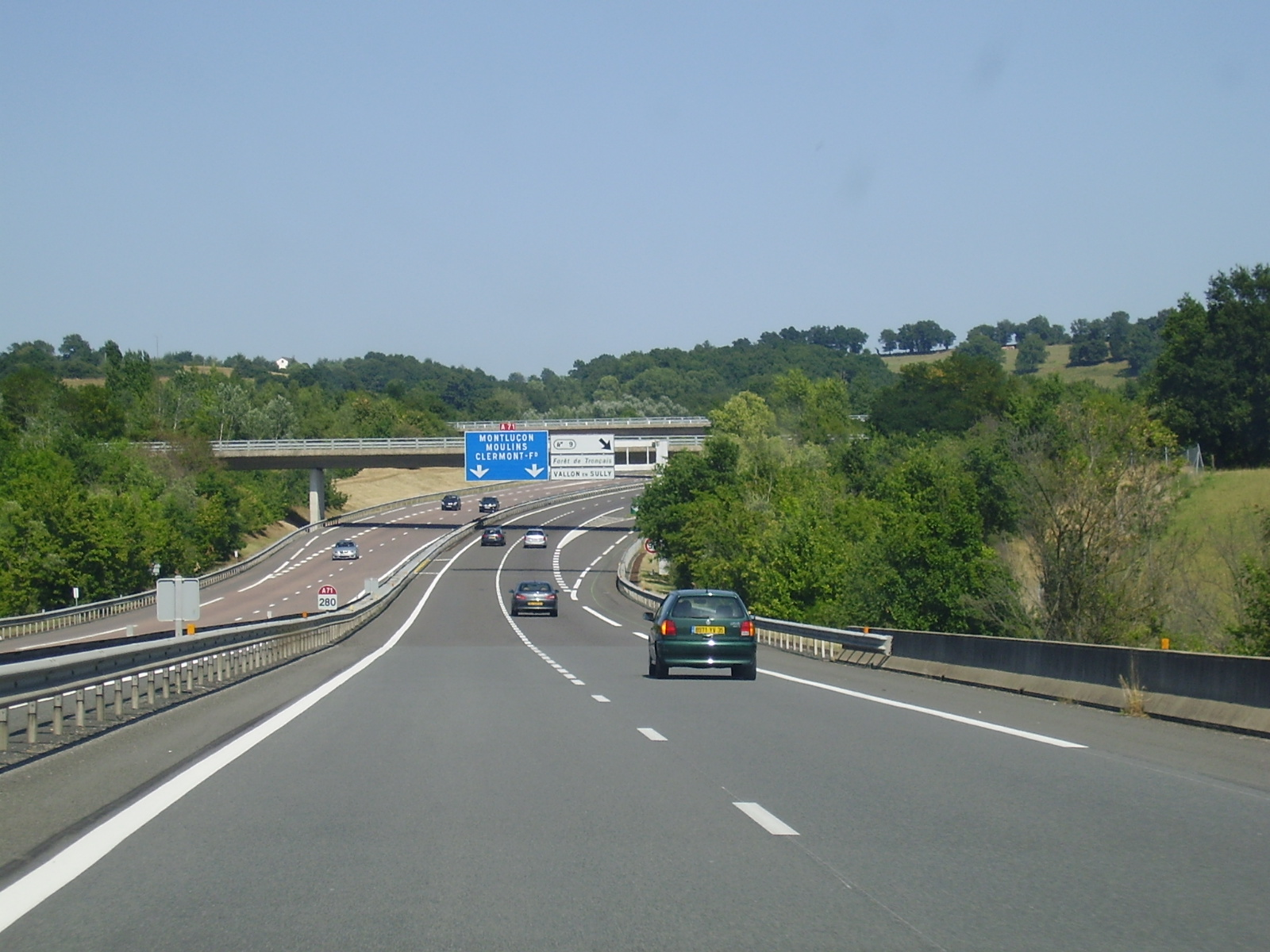 Autoroute A71 avant la sortie 9 Forêt de Tronçais (Allier, Auvergne, France), au kilomètre 280.